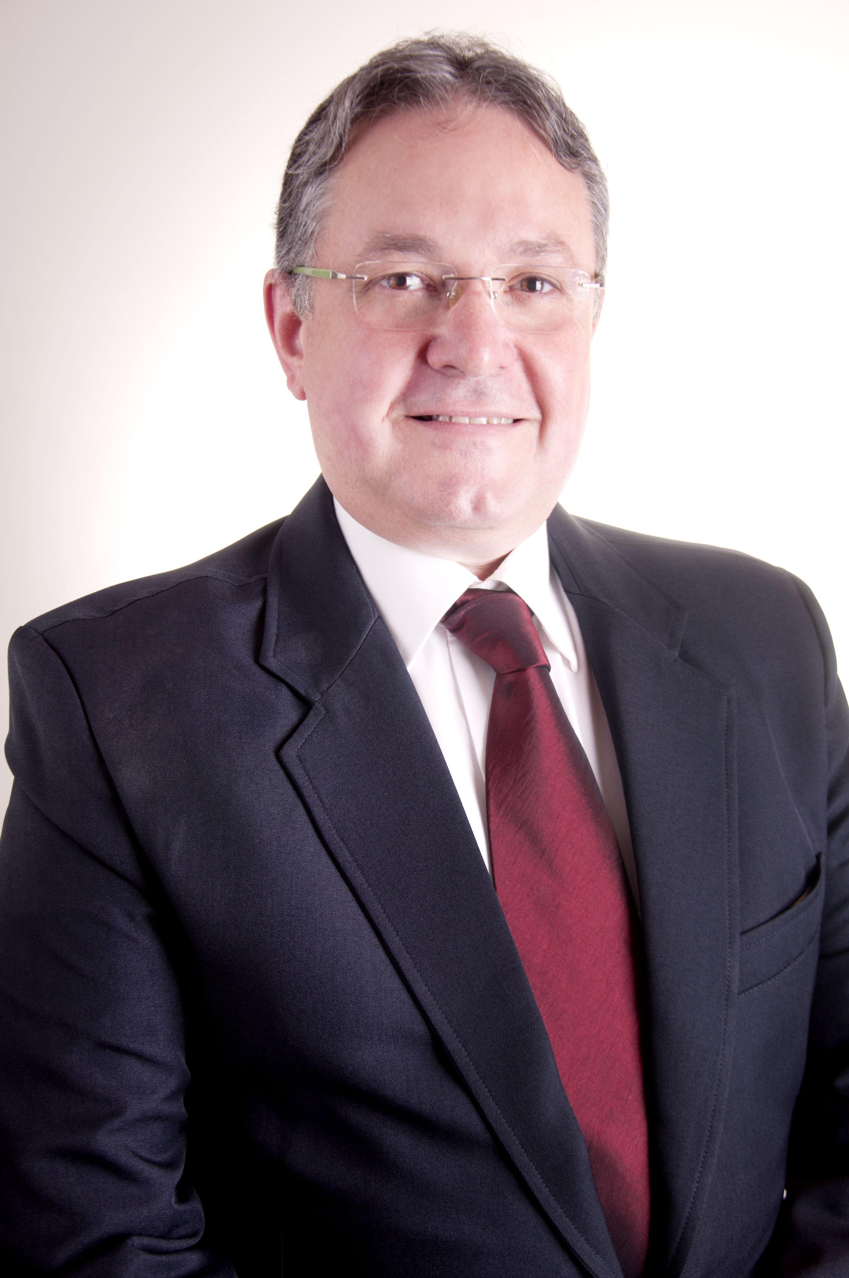 שלמה אייזיק